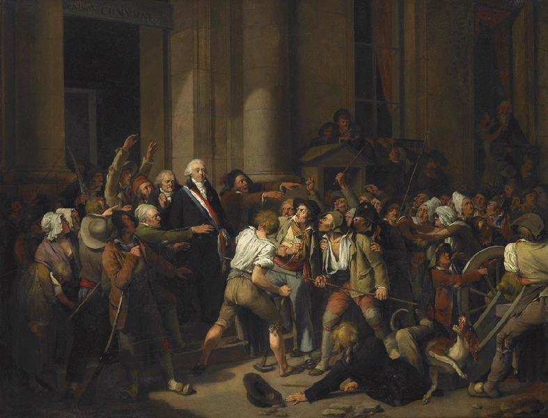 "Une scène de la vie publique de Pierre Nicolas de Fontenay, maire de Rouen en 1792 (titre moderne) Trait de courage de M. de Fontenay maire de Rouen (titre d'origine)"